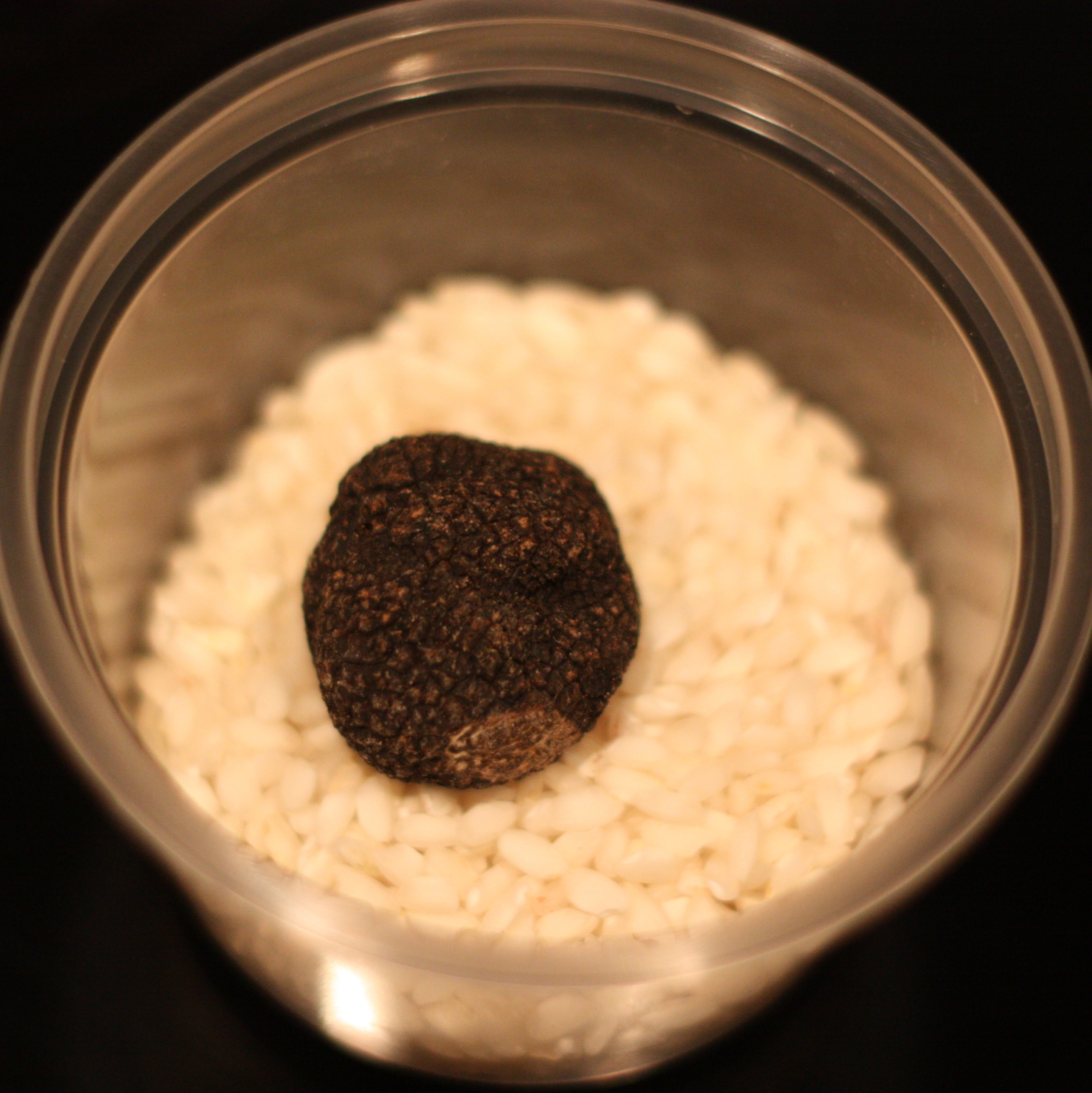 Truffe noire brossée